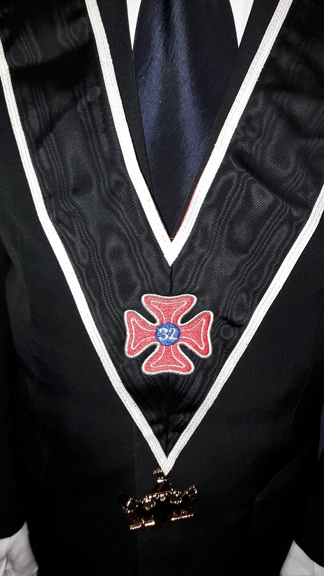 32 AASR